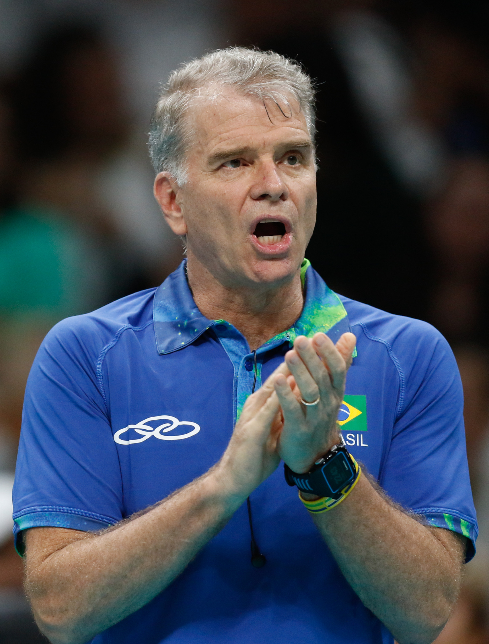 Rio de Janeiro - Seleção brasileira masculina de vôlei vence a da França por 3 sets a 1 no Maracanãzinho e vai às quartas-de-final (Fernando Frazão/Agência Brasil)